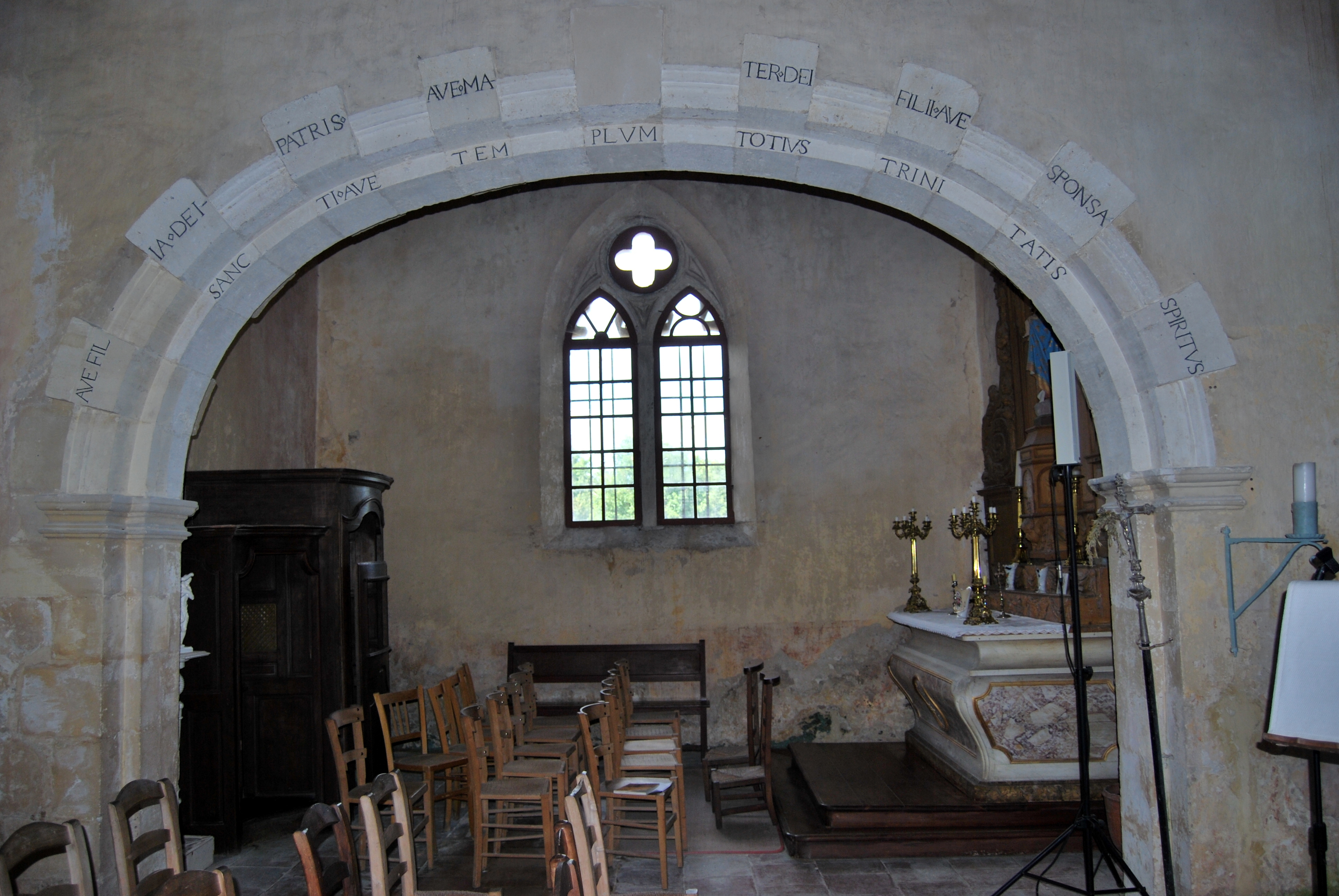 Église Saint-Jean-Baptiste de Cameyrac .